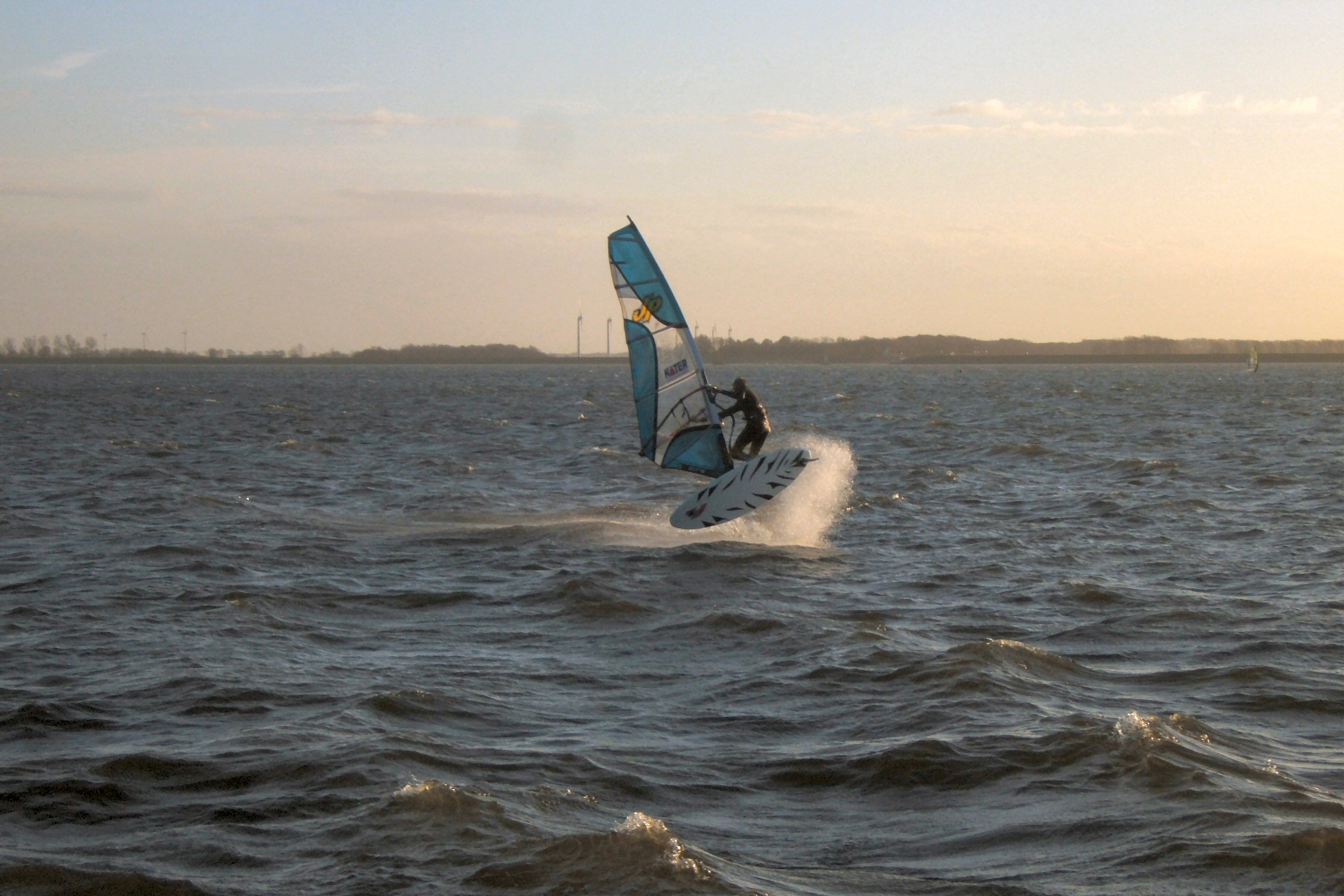 Surfer (Danny Kater) op Amstelmeer.